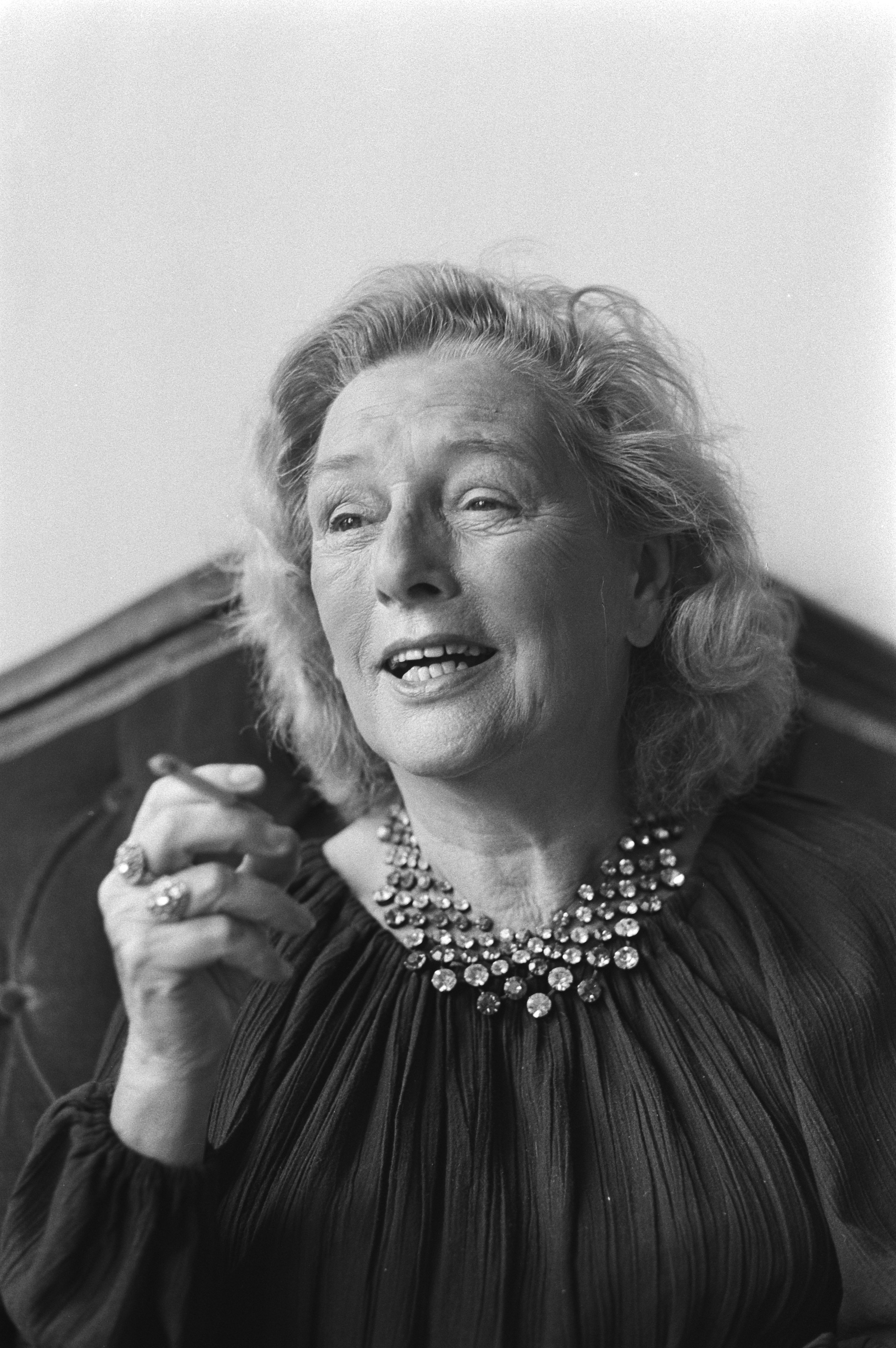 Collectie / Archief : Fotocollectie Anefo Reportage / Serie : Ank van der Moer Beschrijving : Actrice Ank van der Moer Datum : 24 augustus 1981 Trefwoorden : acteurs, portretten Persoonsnaam : Moer, Ank van der Fotograaf : Antonisse, Marcel / Anefo Auteursrechthebbende : Nationaal Archief Materiaalsoort : Negatief (zwart/wit) Nummer archiefinventaris : bekijk toegang 2.24.01.05 Bestanddeelnummer : 931-6398